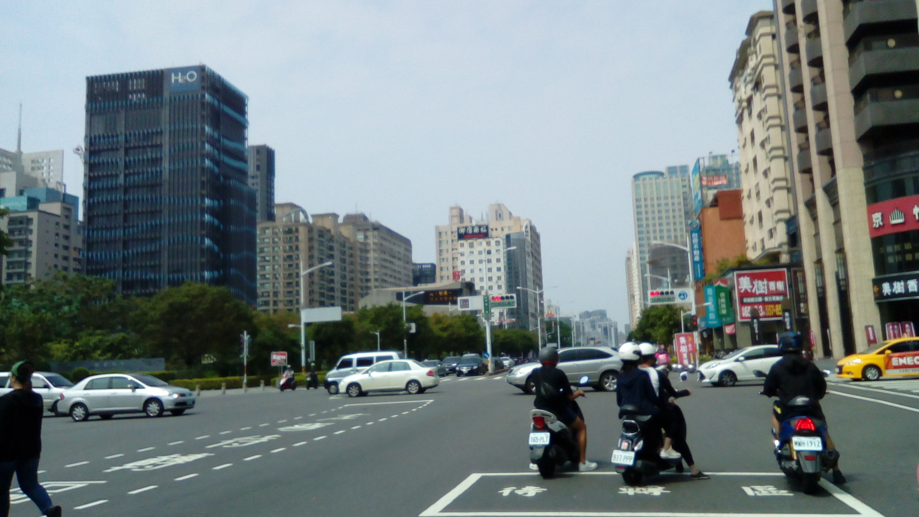 捷運凹子底及巨蛋站一帶 因高雄市區北擴而繁榮